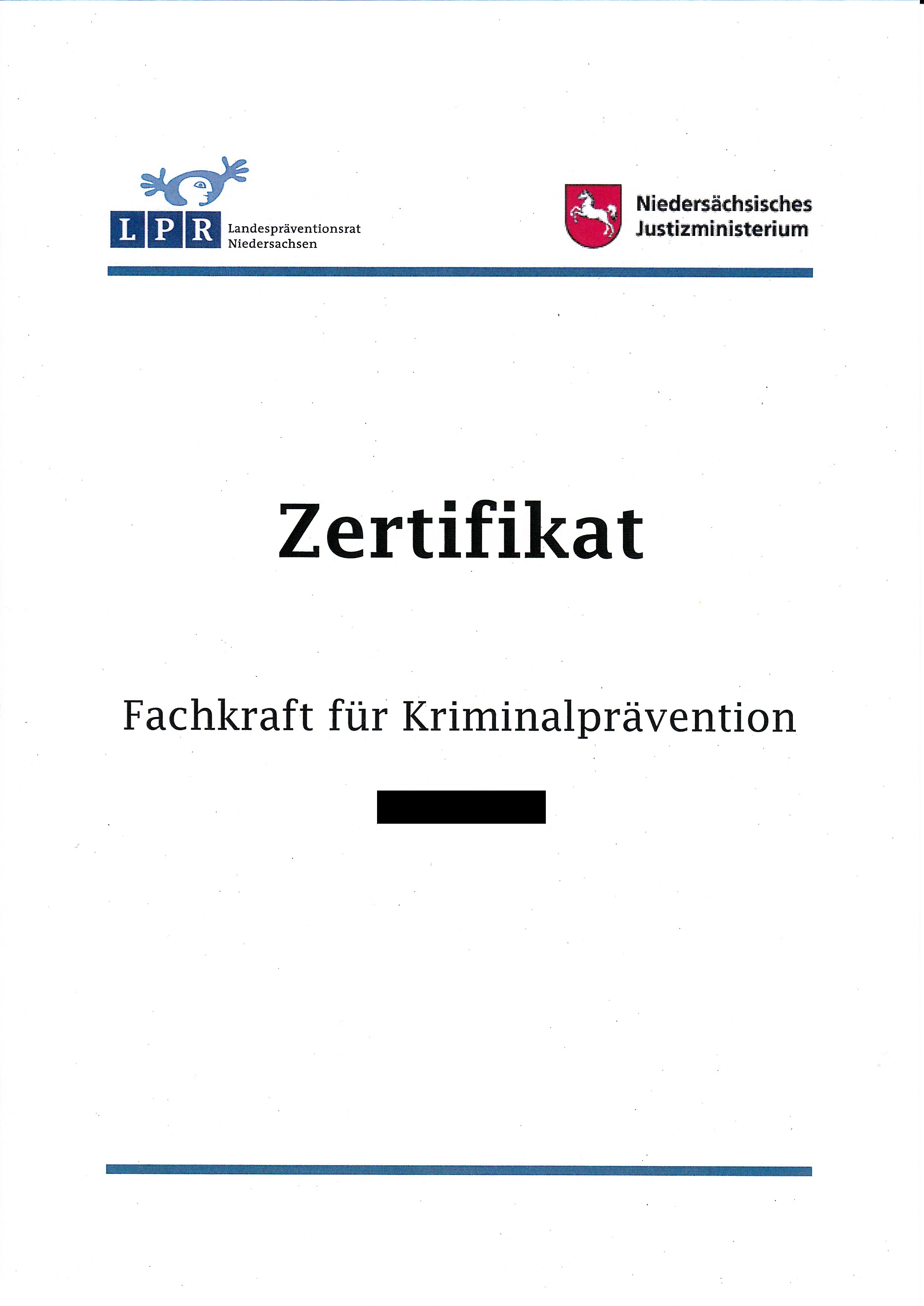 Vorderseite des Zertifikats